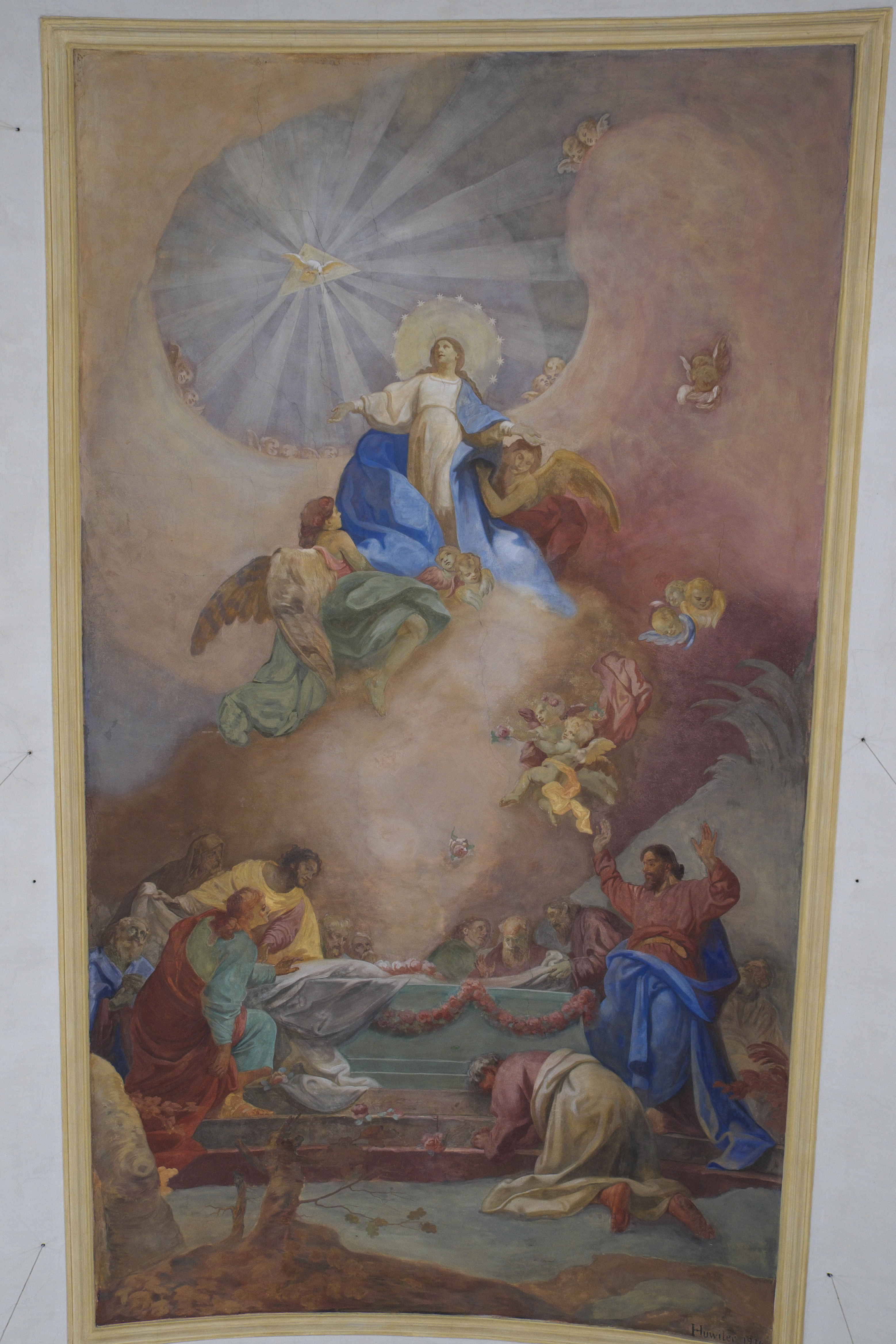 Katholische Filialkirche Mariä Geburt in Traubing, einem Ortsteil von Tutzing im Landkreis Starnberg (Bayern/Deutschland), Deckenmalerei mit der Signatur: Huwiler 1916